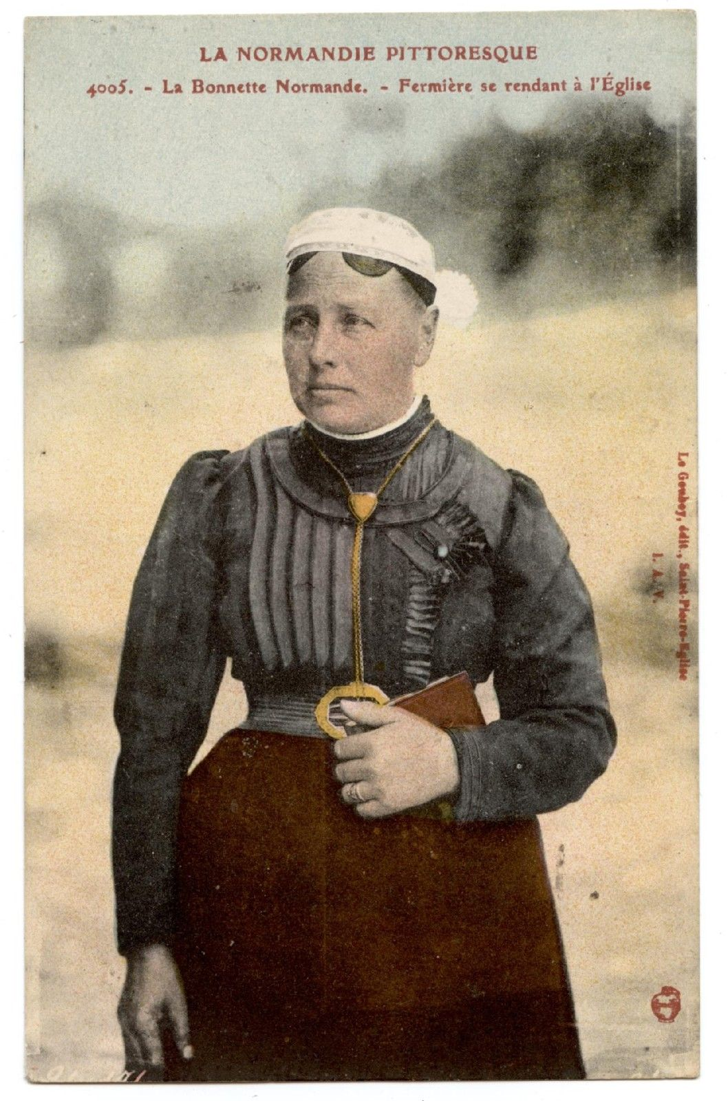 Fermière se rendant à la messe, coiffée d'une bonnette normande.